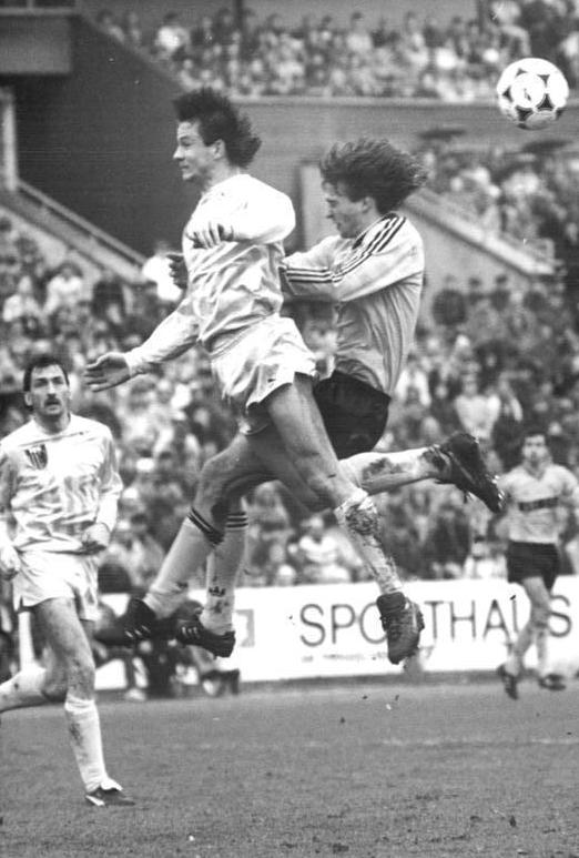 ADN-ZB-Häßler- -10.3.90-roe- Dresden: Fußball-Oberliga Dynamo Dresden - FC Karl-Marx-Stadt - Torsten Bittermann (l) vom FCK kann hier den Ball vor dem Dresdner Steffen Büttner noch abwehren. Am Ende gewinnt Dresden mit 2:0.